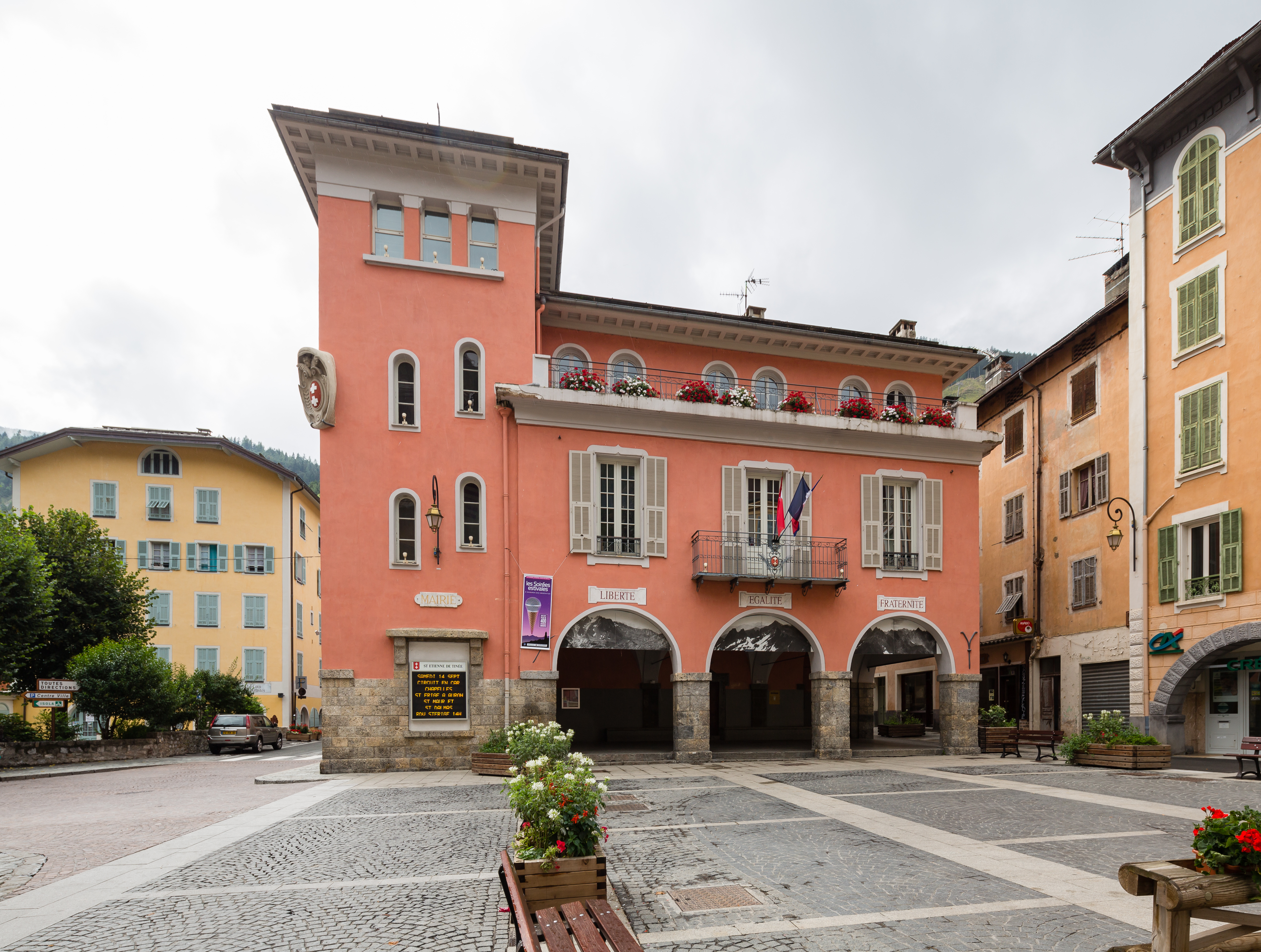 La mairie de Saint-Étienne-de-Tinée (France).